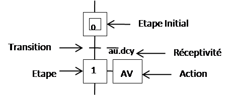 La représentation des éléments d'un Grafcet